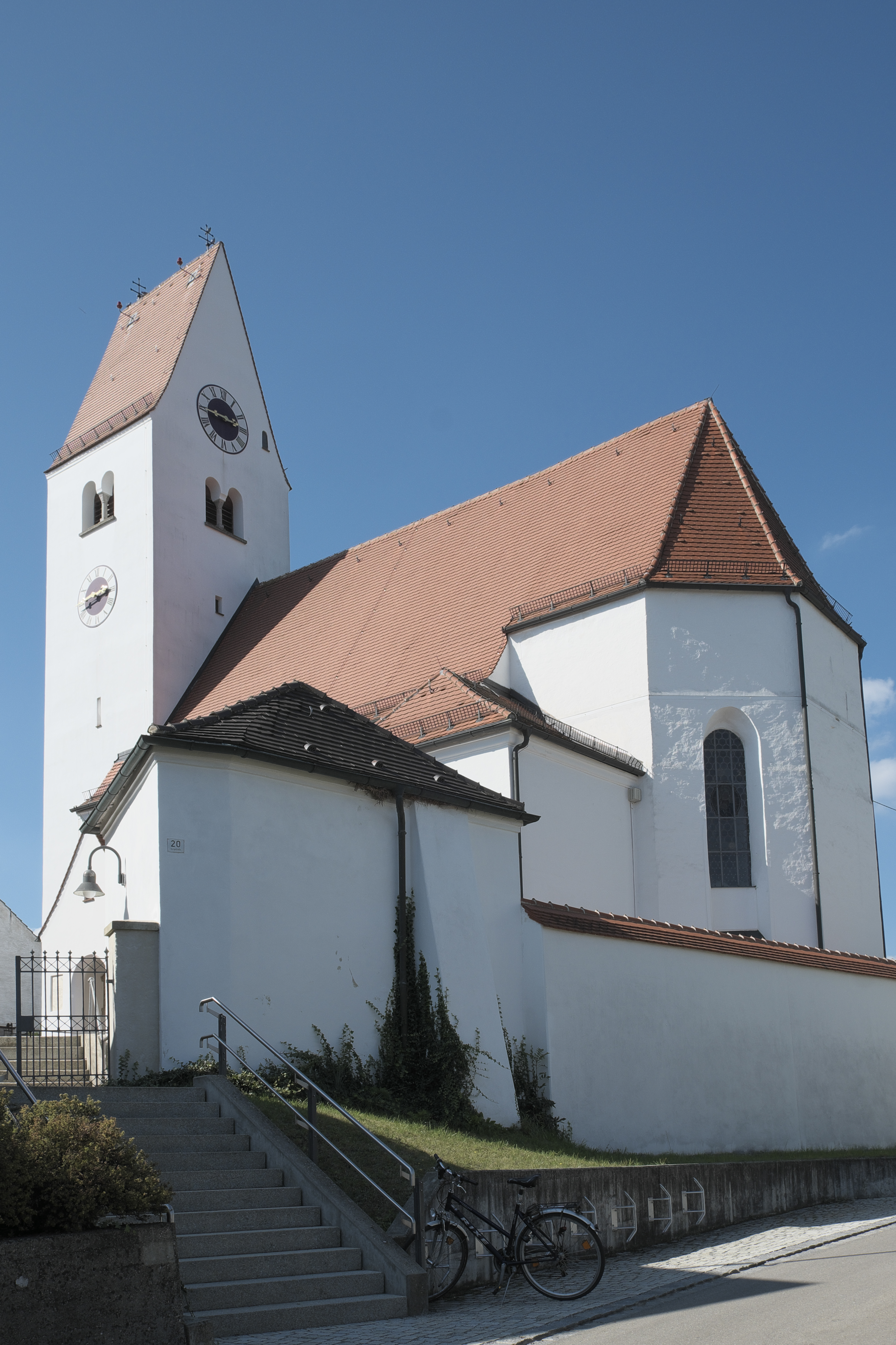 Katholische Pfarrkirche St. Laurentius in Hurlach im Landkreis Landsberg am Lech (Bayern/Deutschland)